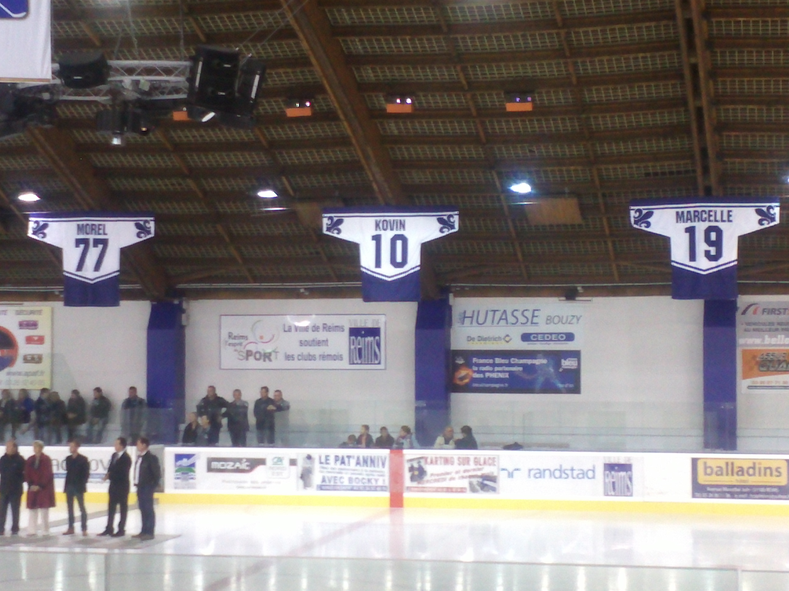 Cérémonies des maillots retirés avant le match Phénix de Reims-Hormadi d'Anglet.